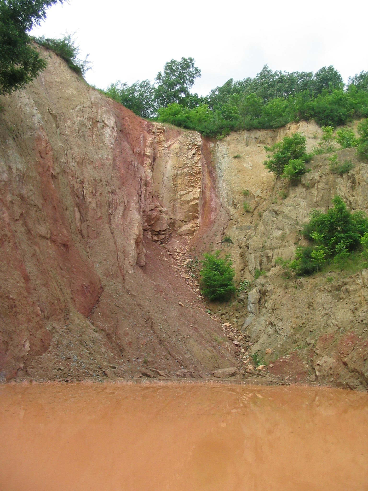 Oberste Abbausohle des Quarzitgangs am Borstein bei Reichenbach (Odenwald)